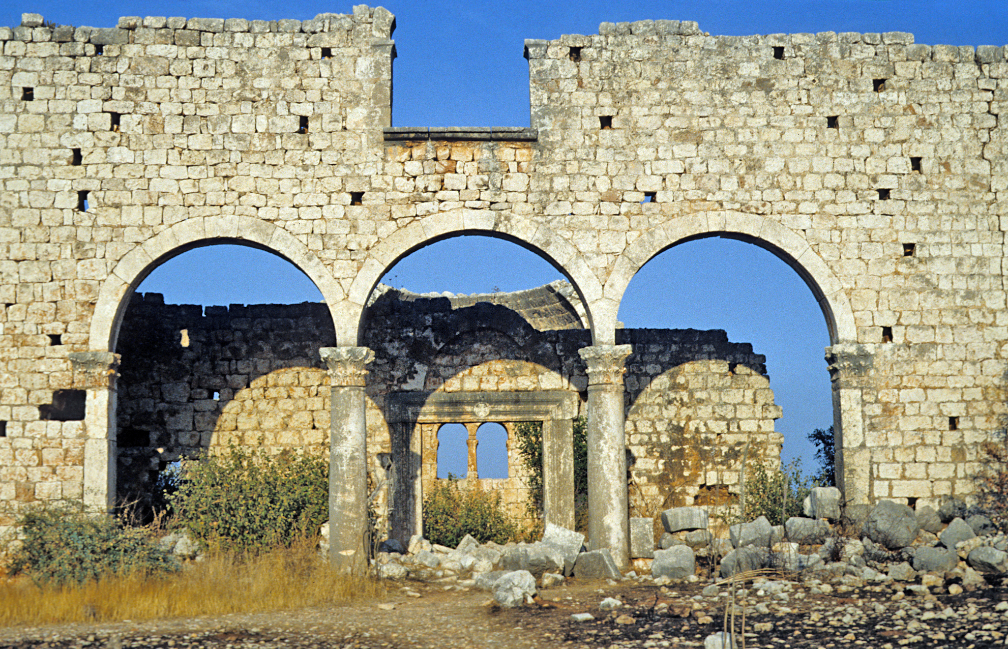 Kanytelleis/Kanlıdivane, archäologischer Fundort in der Südtürkei, Tribelon der Basilika I